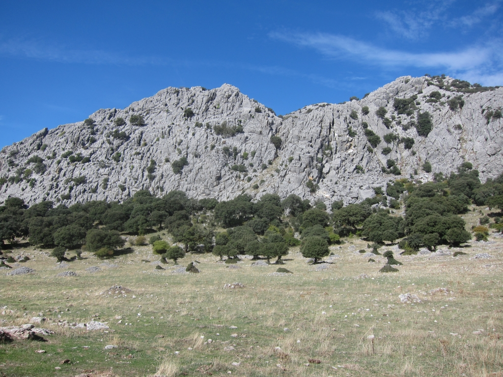 SIerra de Líbar